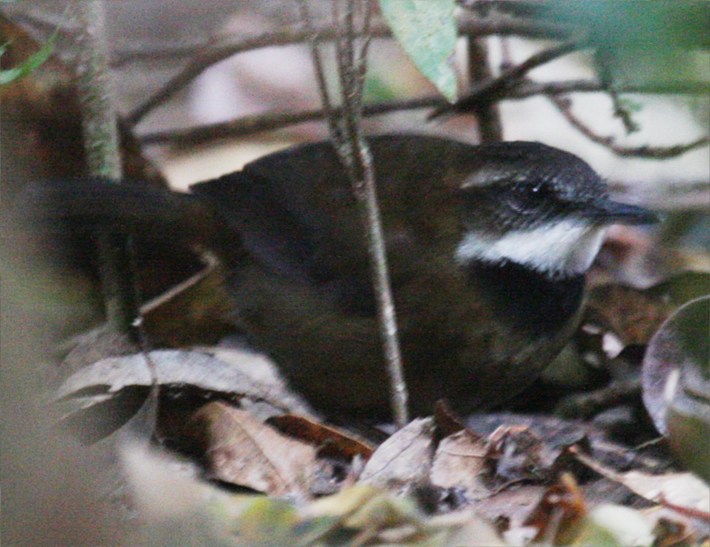 Fernwren (Oreoscopus gutturalis, cat.)